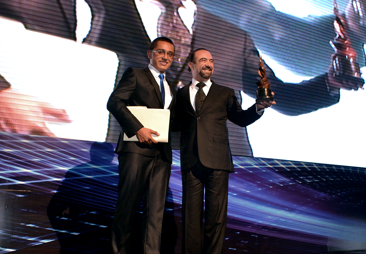 Foto de Eugenio Baeza Fares